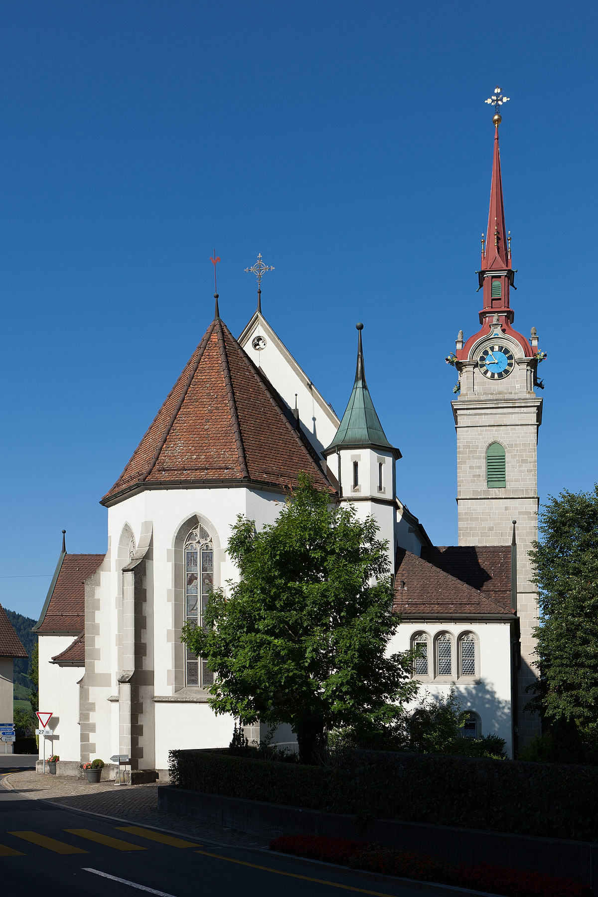 Katholische Kirche St. Peter und Paul in Oberägeri (ZG)